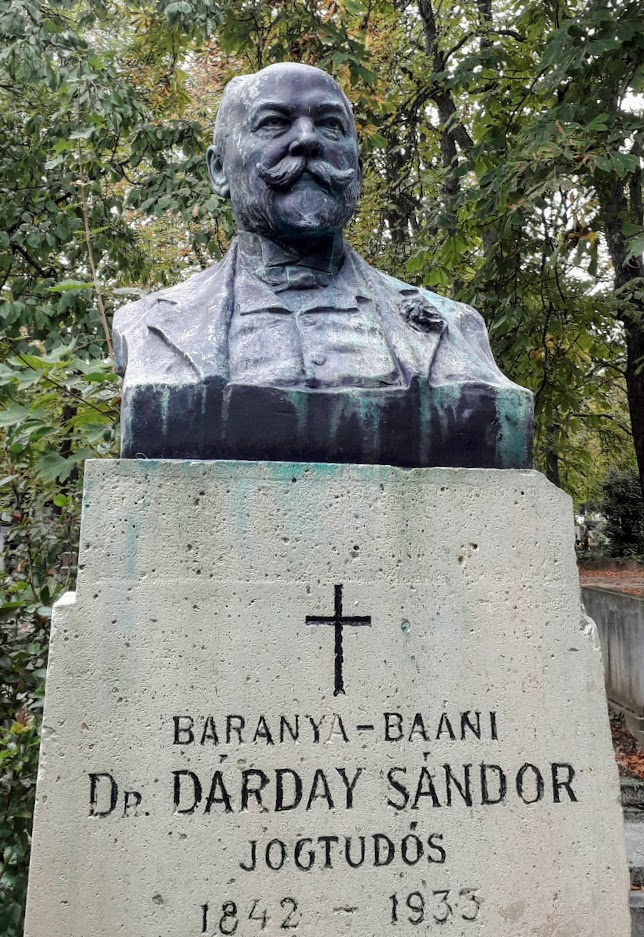 A farkasréti temető 41 parcella 1 sor 25 sírhelyén található ez a családi síremlék, melyen Dr. Dárday Sándor jogtudóst ábrázolja a mellszobor, Szende Fülöpné Dárday Olga szobrászművész alkotása.